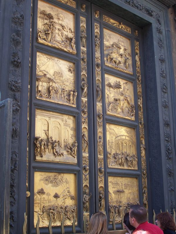 Battistero, Firenze, Italy